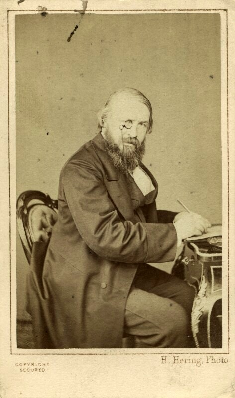 Photograph by Henry Hering